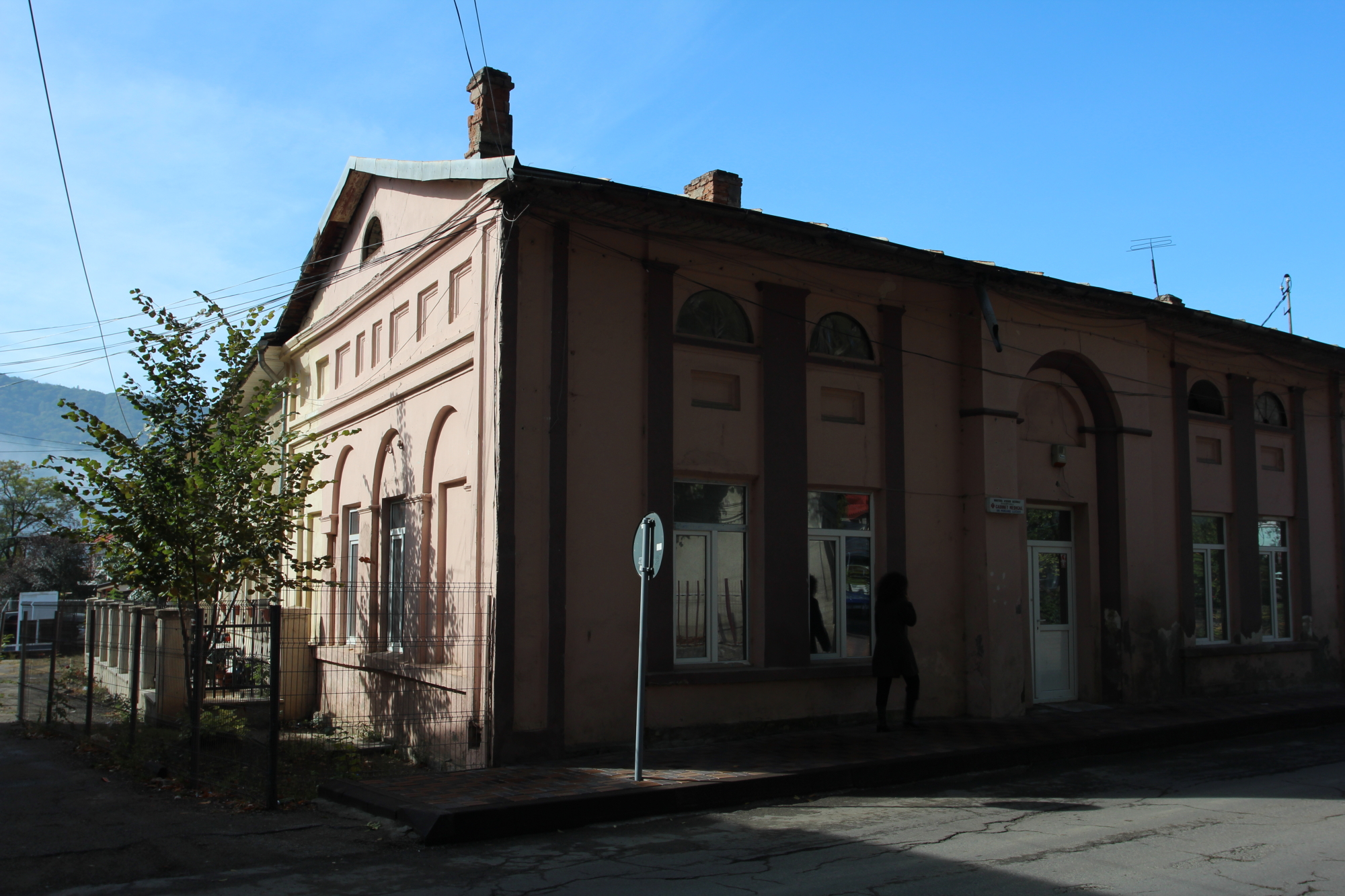 Casa Albu